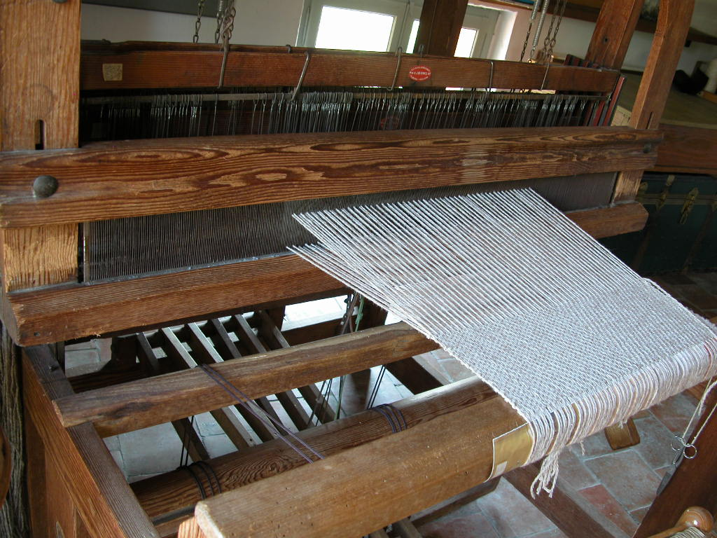 foto mia personale, pettine con ordito, 2007 Licensing Categoria:Immagini sulla tessitura